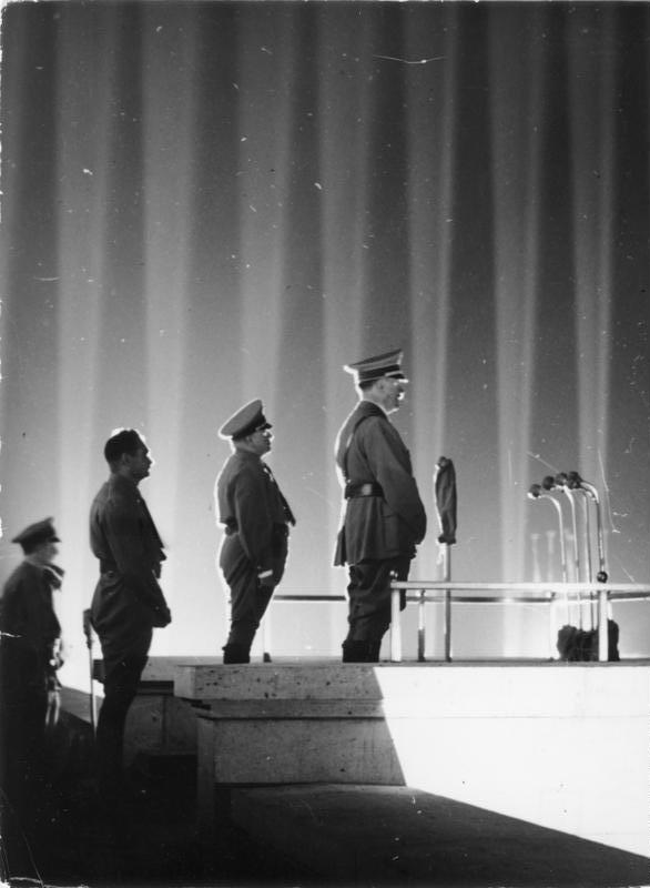 This description has been identified as biased or incorrect: Nazi-PropagandaNürnberg, Reichsparteitag 8. -14. September 1936, Adolf Hitler vor Lichtdom 14.000 Politische Leiter zum Appell vor dem Führer, Der Freitag [11.9.1936] sah die gewaltige Heerschau der Politischen Leiter auf dem Zeppelinfeld vor dem Führer. 14000 Männer traten vor Adolf Hitler zum Treueschwur an und um Weisungen des Führers für ihre zukünftige Arbeit entgegenzunehmen. UBz.: Adolf Hitler auf der Tribüne. Weiter erkennt man den Reichsorganisationsleiter Dr. Ley und Reichsminister Rudolf Hess. Bei Abdruck nennen: Scherl Bilddienst, Berlin 12.9.1936 [Herausgabedatum] [Nürnberg.- Reichsparteitag der NSdAP, "Reichsparteitag der Ehre", Rudolf Heß, Robert Ley und Adolf Hitler auf Tribüne vor "Lichtdom", 8.-14. September 1936] Abgebildete Personen: Hitler, Adolf: Reichskanzler, Deutschland Heß, Rudolf: Stellvertreter Hitlers als Führer der NSDAP, Kanzleileiter, Deutschland (GND 11855039X) Ley, Robert: Reichsorganisationsleiter, Deutsche Arbeitsfront (DAF), Generalrat der Wirtschaft, Deutschland